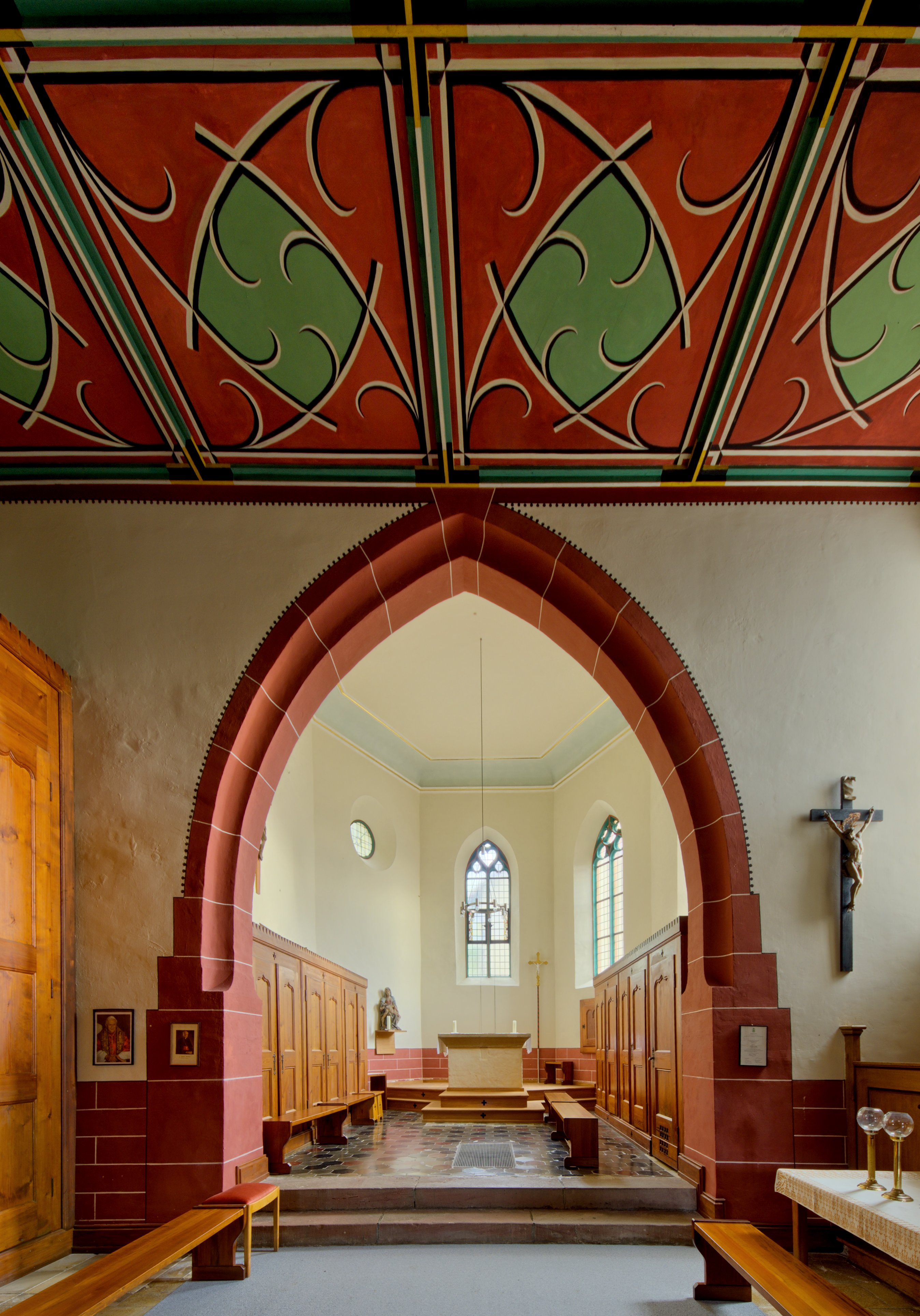 Bilder des Innenraums der St. Georgskirche in Ehrenstetten, einem Teil der Gemeinde von Ehrenkirchen.